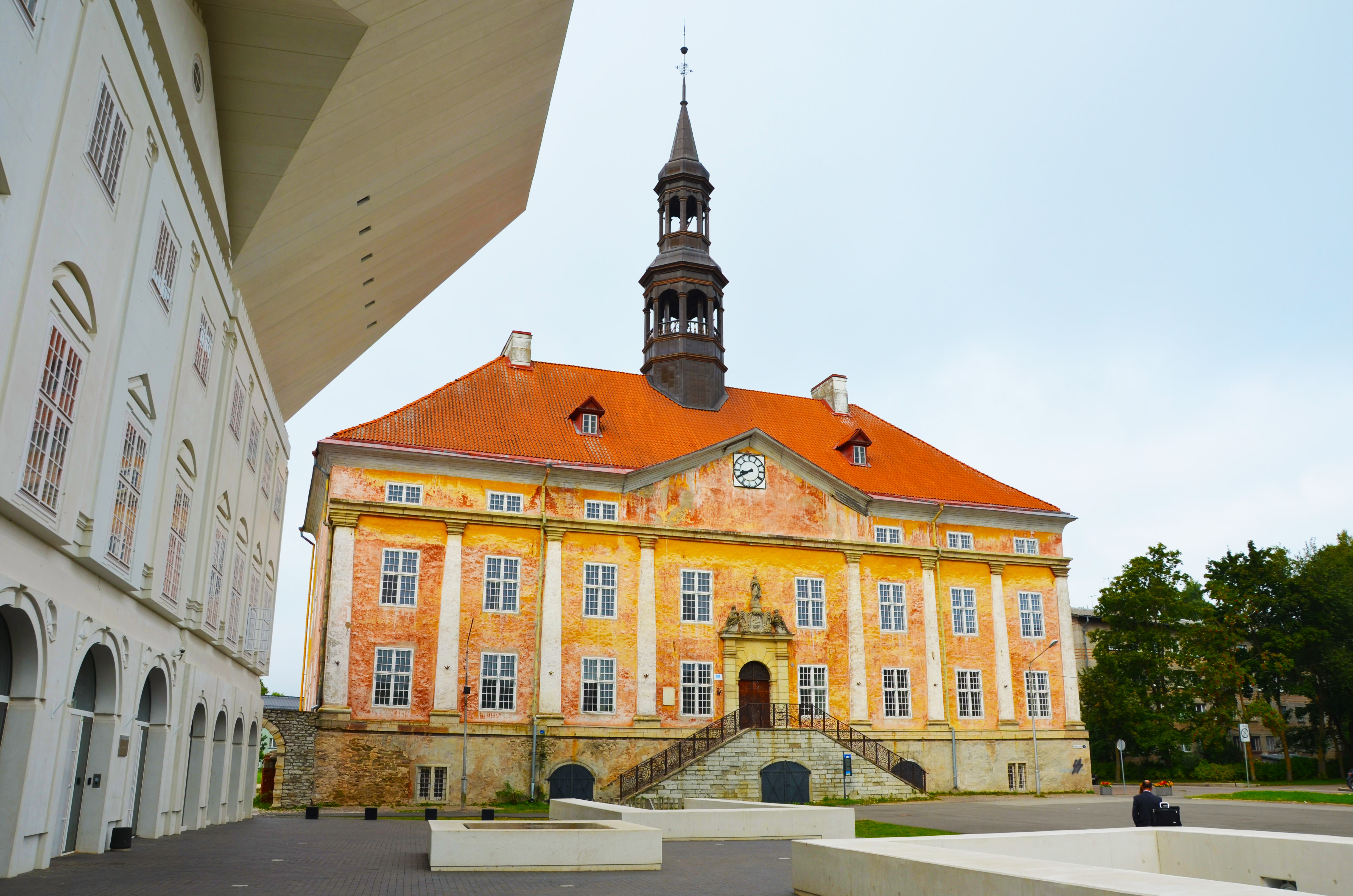 Narva Raekoda ja Narva kolledž